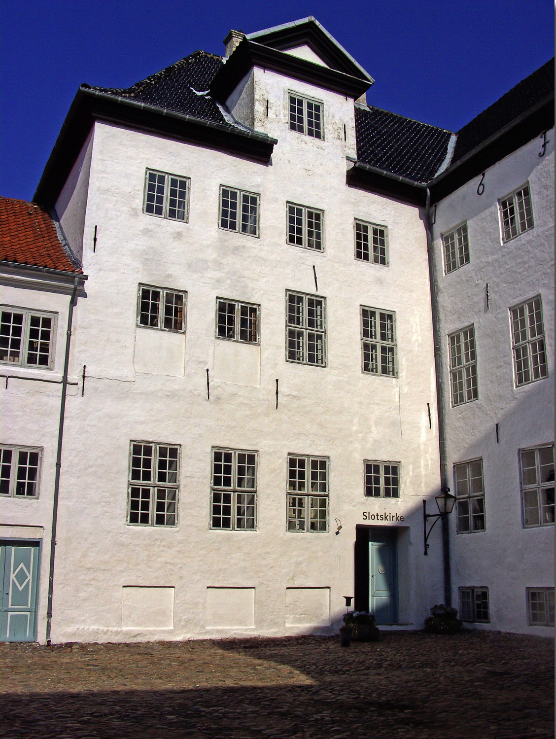 fra indergården